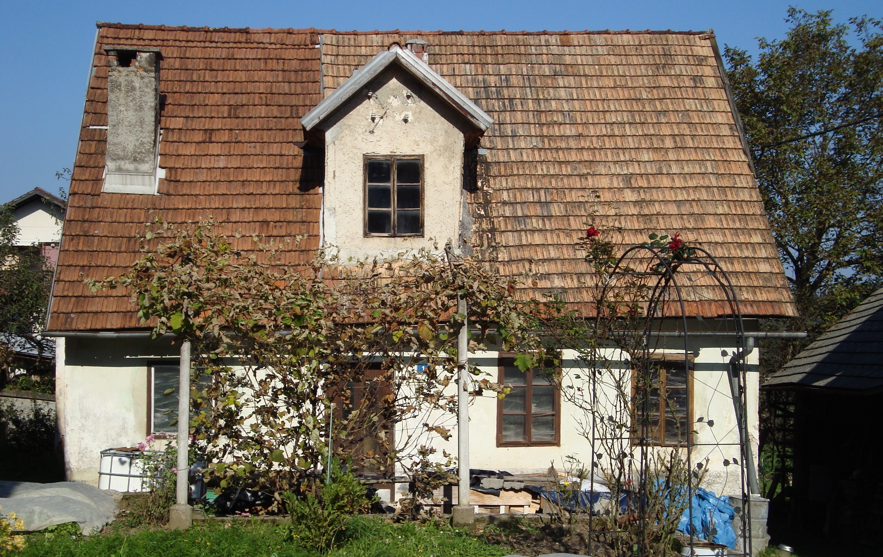 Javorškova rojstna hiša.